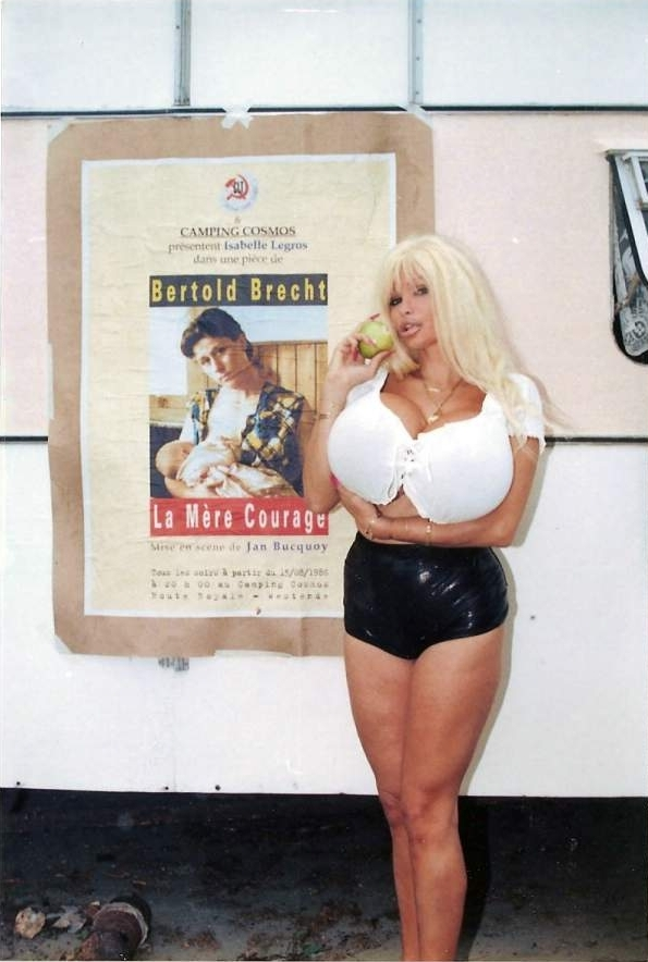 Lolo Ferrari présente l'affiche de Mère Courage et ses enfants au camping cosmos.